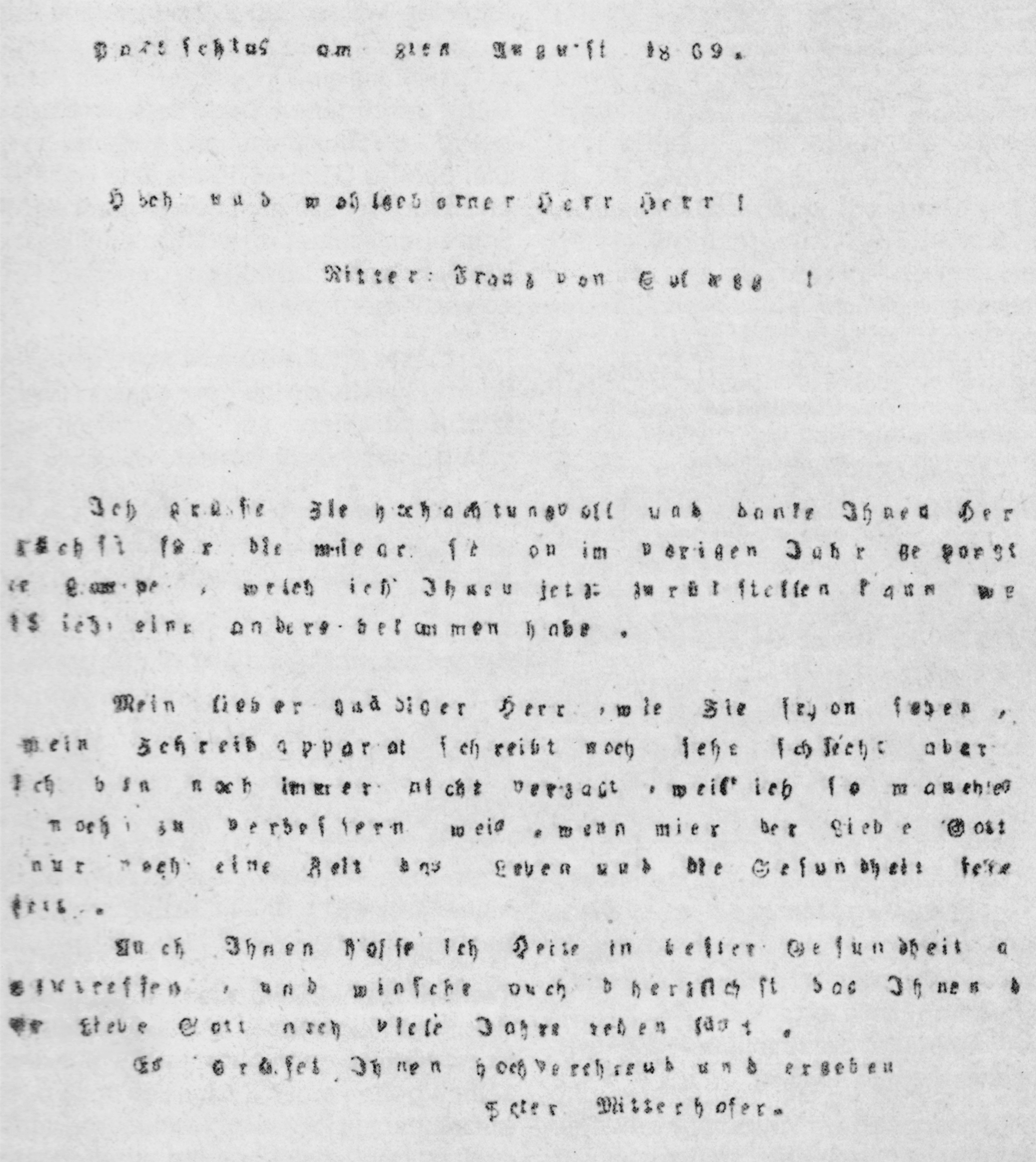 Der erste auf einer Maschine geschriebene Brief, (1869)